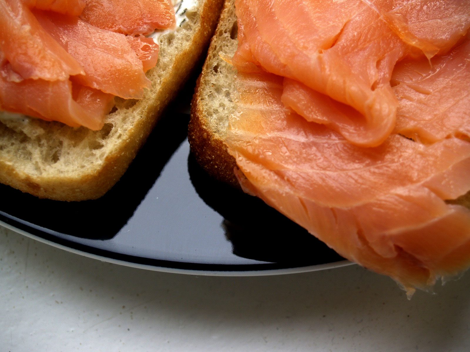 Laksemadder